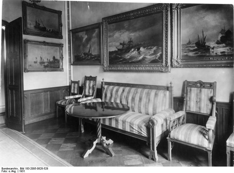 Scherl Bilderdienst: Schloß Babelsberg bei Potsdam; Frühstückszimmer 31701-31